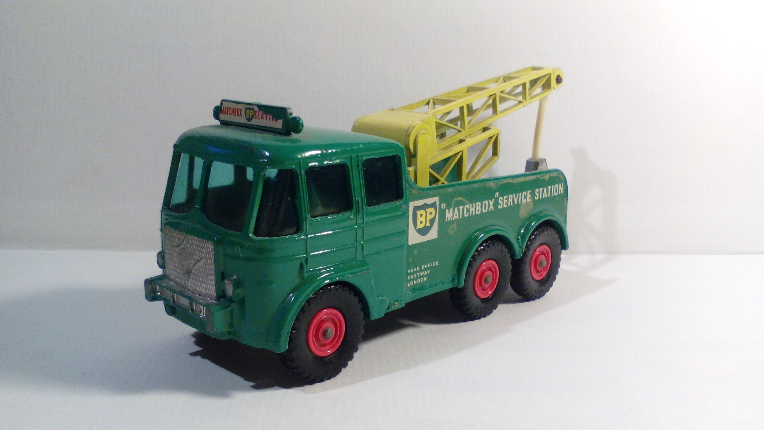 Matchbox King Size No. 12, Foden Breakdown Tractor, from the 1960s